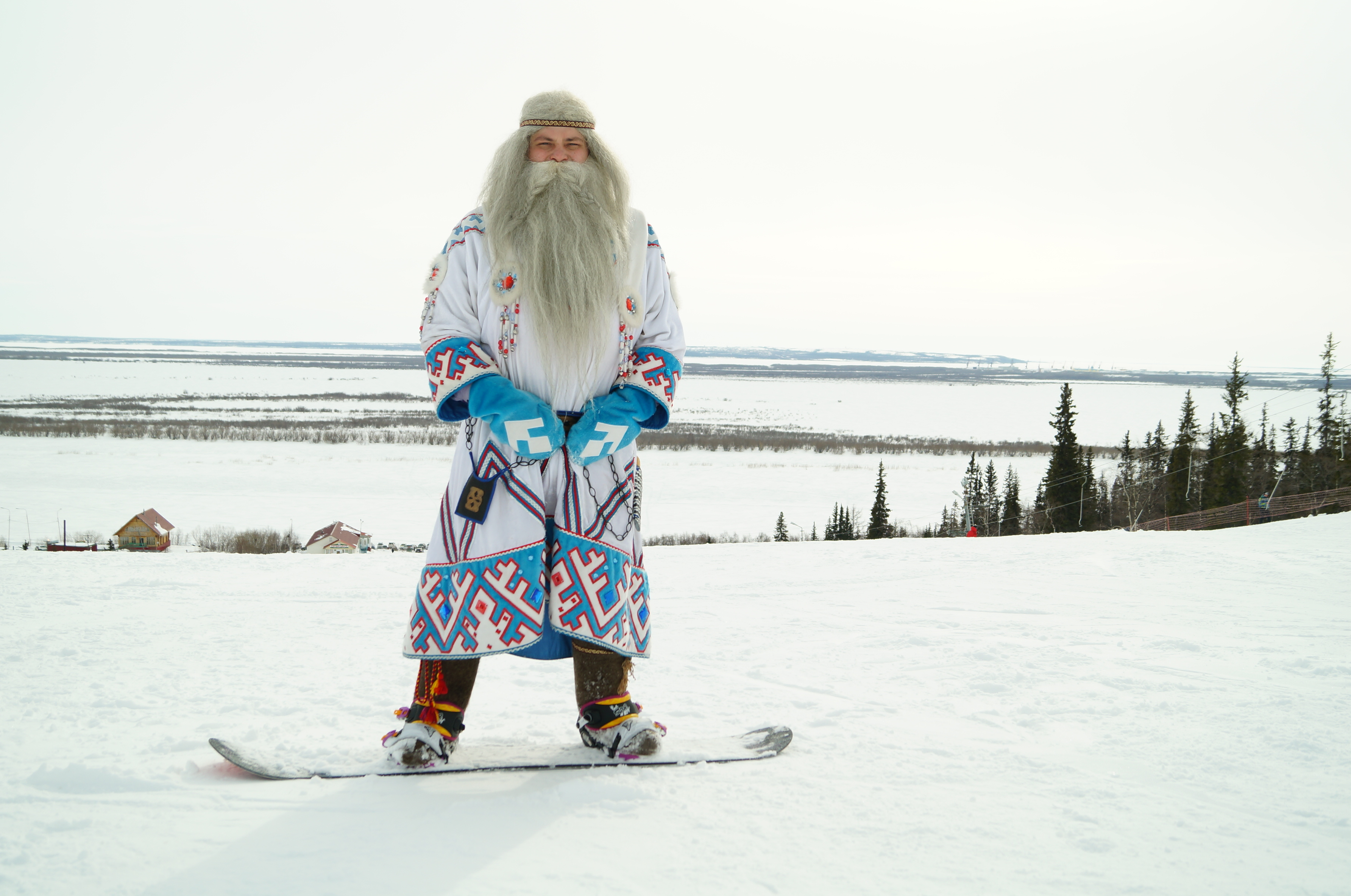 Ямальский Дед Мороз на сноуборде